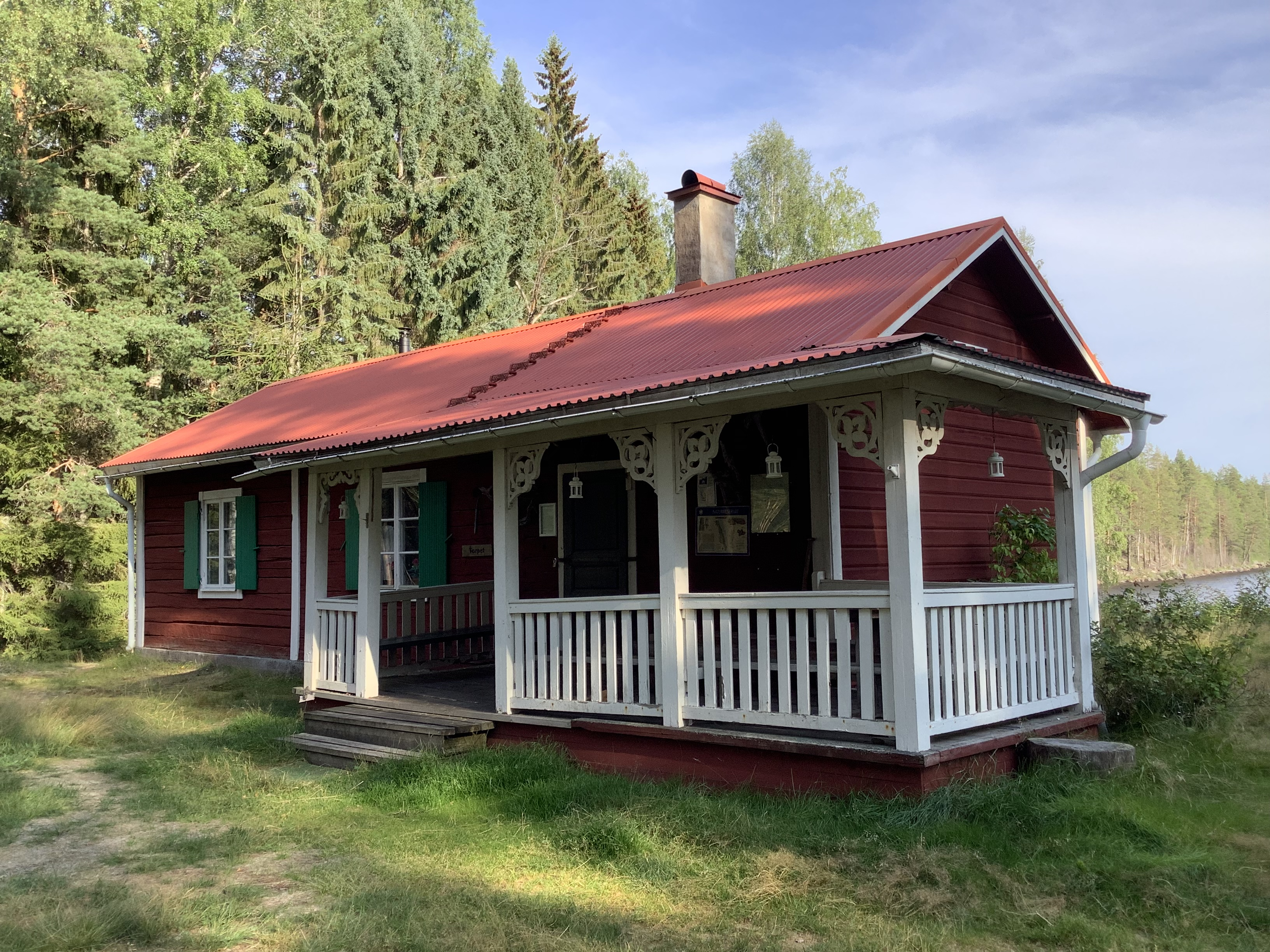 Vikstenstorpet, författaren Albert Vikstens torp vid sjön Ängratörn i Ljusdals kommun i Hälsingland, augusti 2020.